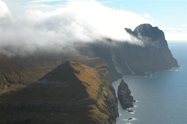 Lopranseiði, Suðuroy, Faroe Islands.